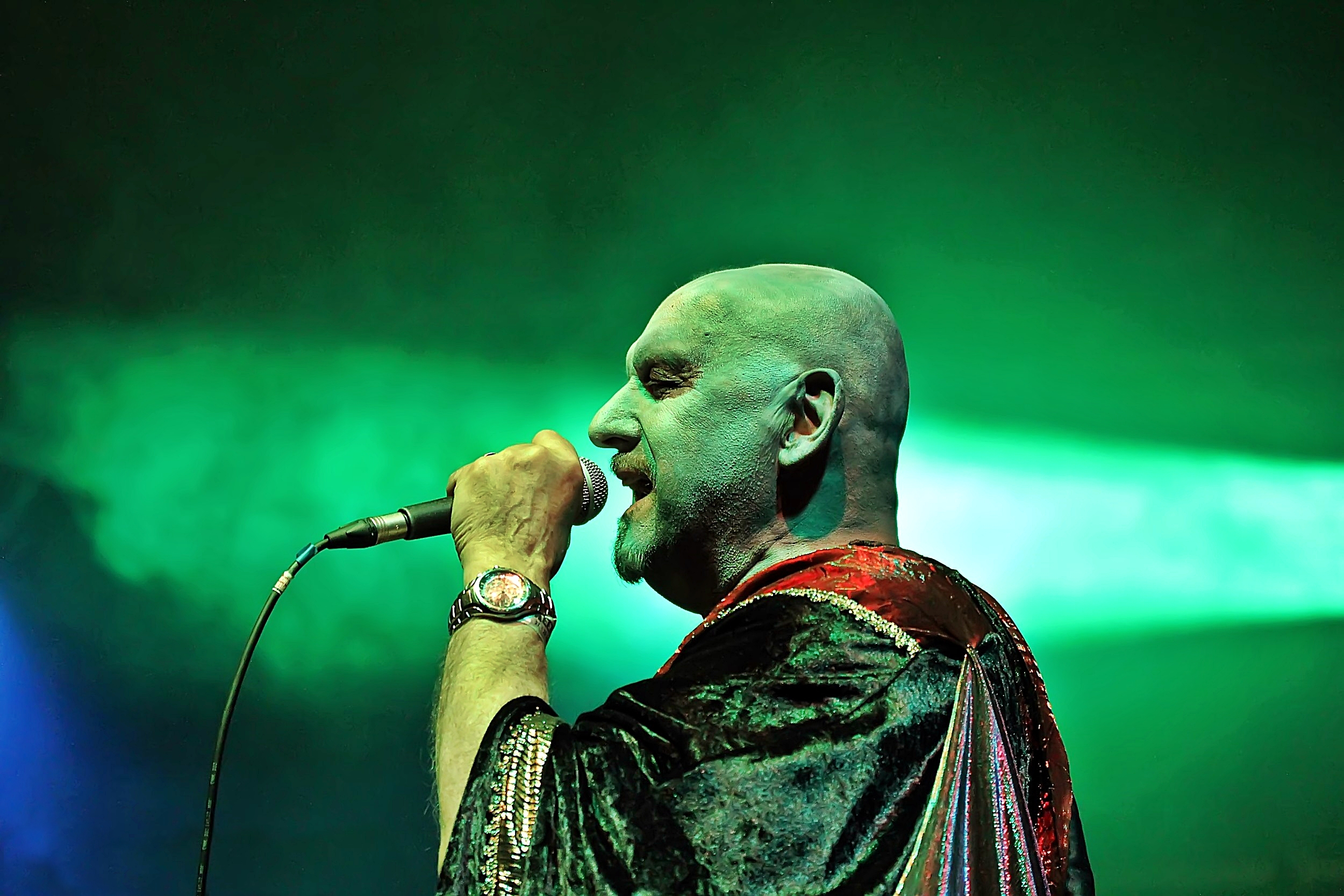 Dave Hill - 2018 - Keep It True